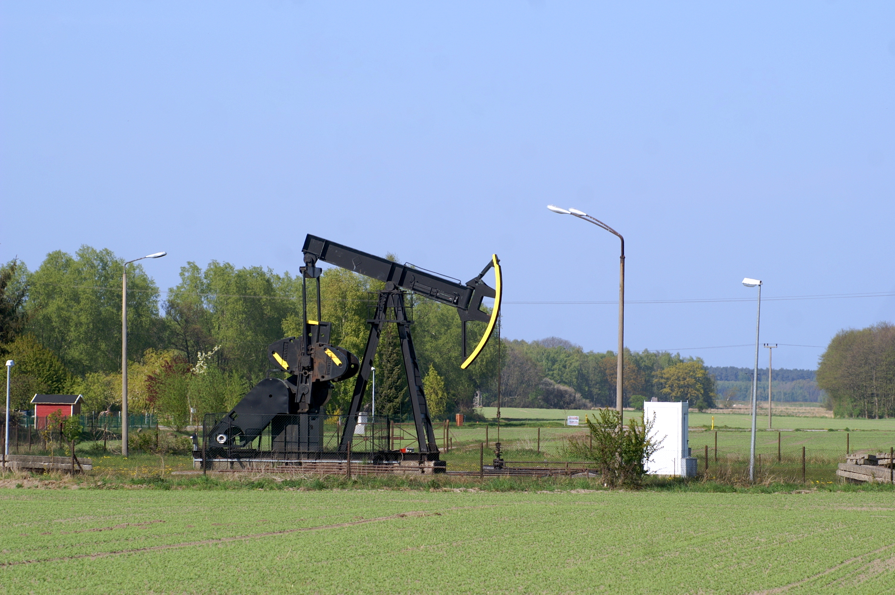 Lütow, Erdölförderpumpe östlich von Neuendorf